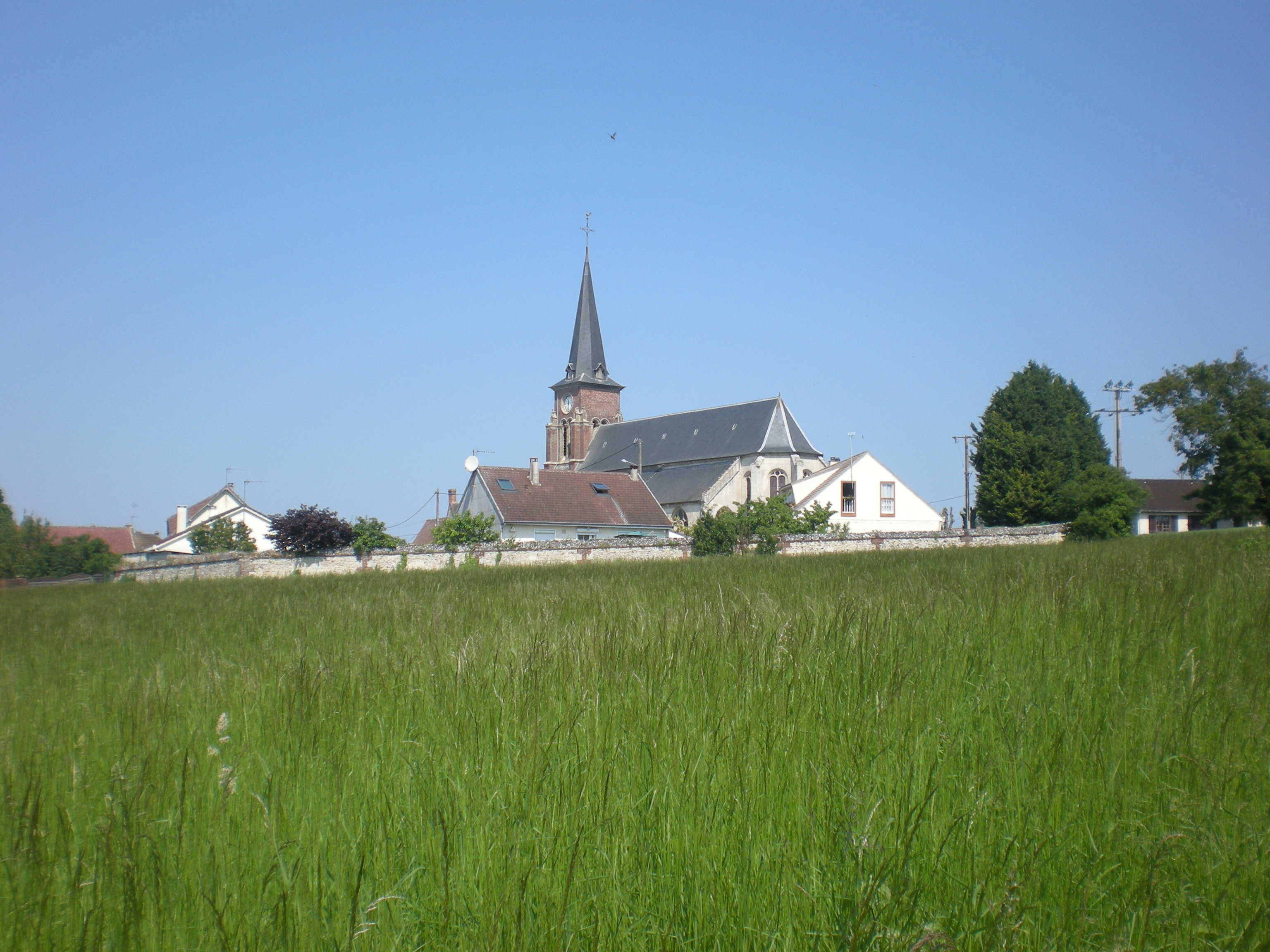 L'église d'étouy depuis les champs